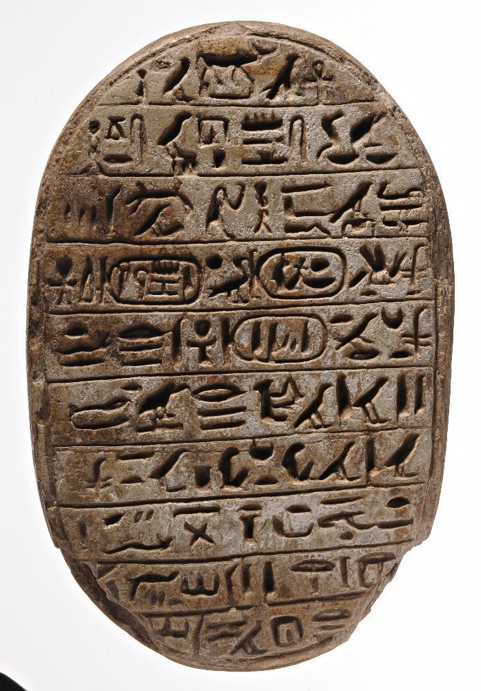 Huwelijksscarabee Amenhotep III van zijn huwelijk met Teje, gemaakt in het tweede regeringsjaar.